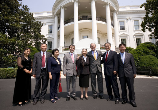 图片转自白宫网站。图片左起：黄慈萍，魏京生，龚小夏，翻译Alim Seytoff，热比娅，布什总统，吴弘达，付希秋